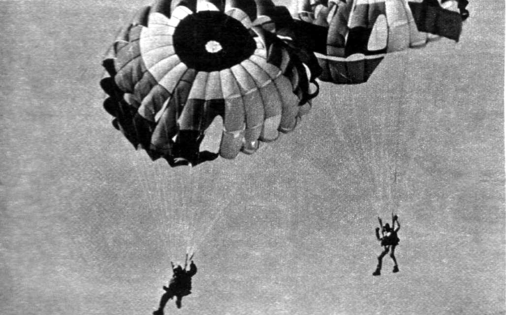 III Spadochronowe Mistrzostwa Śląska na celność lądowania Gliwice 1969, konkurencja skoków grupowych na zawodach - Sekcja Spadochronowa Aeroklubu Gliwickiego